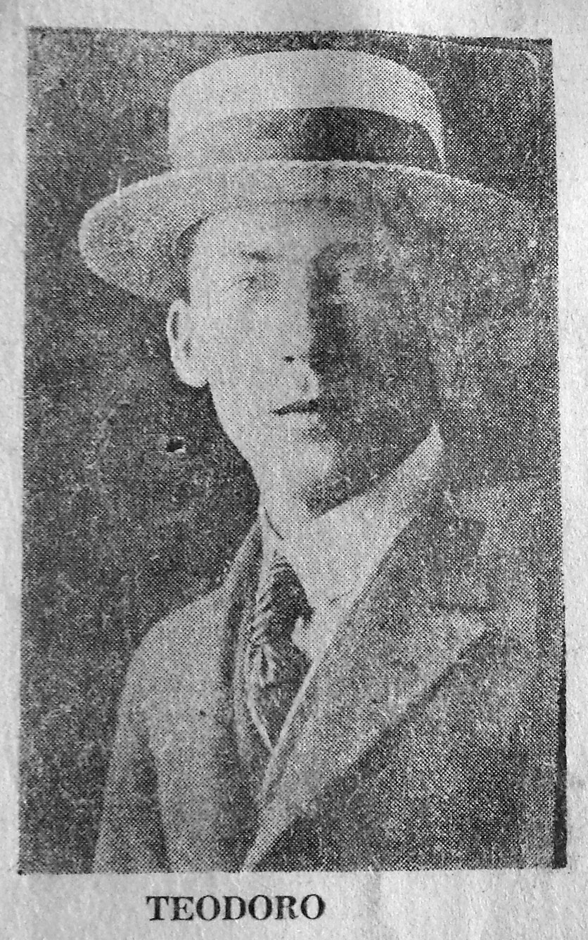 Demonte